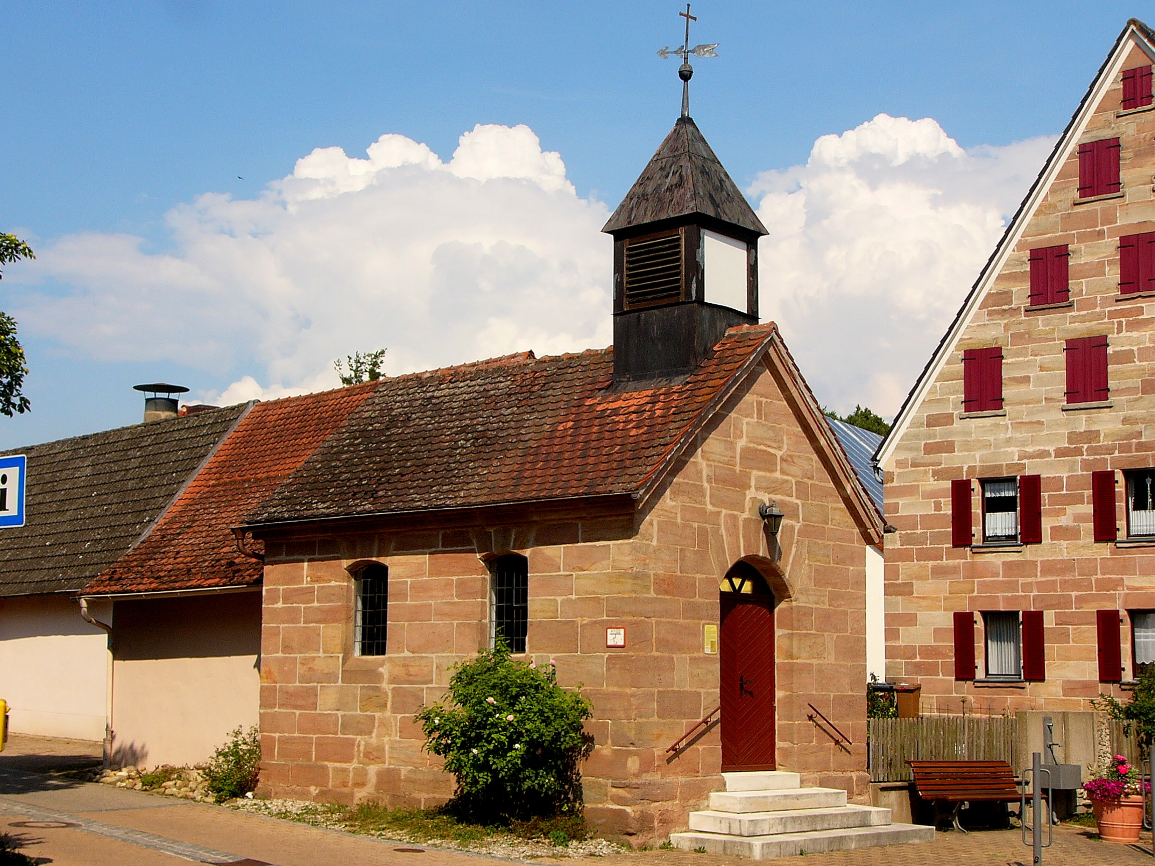 Dorfkapelle; kleiner Satteldachbau mit Dachreiter, Sandsteinquader, Ende 19. Jahrhundert, mit Ausstattung. This is a photograph of an architectural monument.